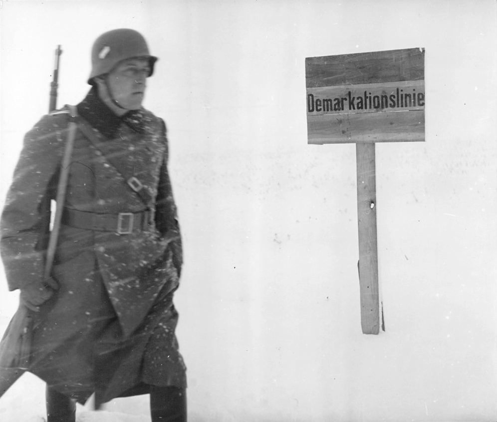 Tysk soldat i f.d. Polen vid demarkationslinjen, nya gränsen mellan Tyskland-Ryssland.